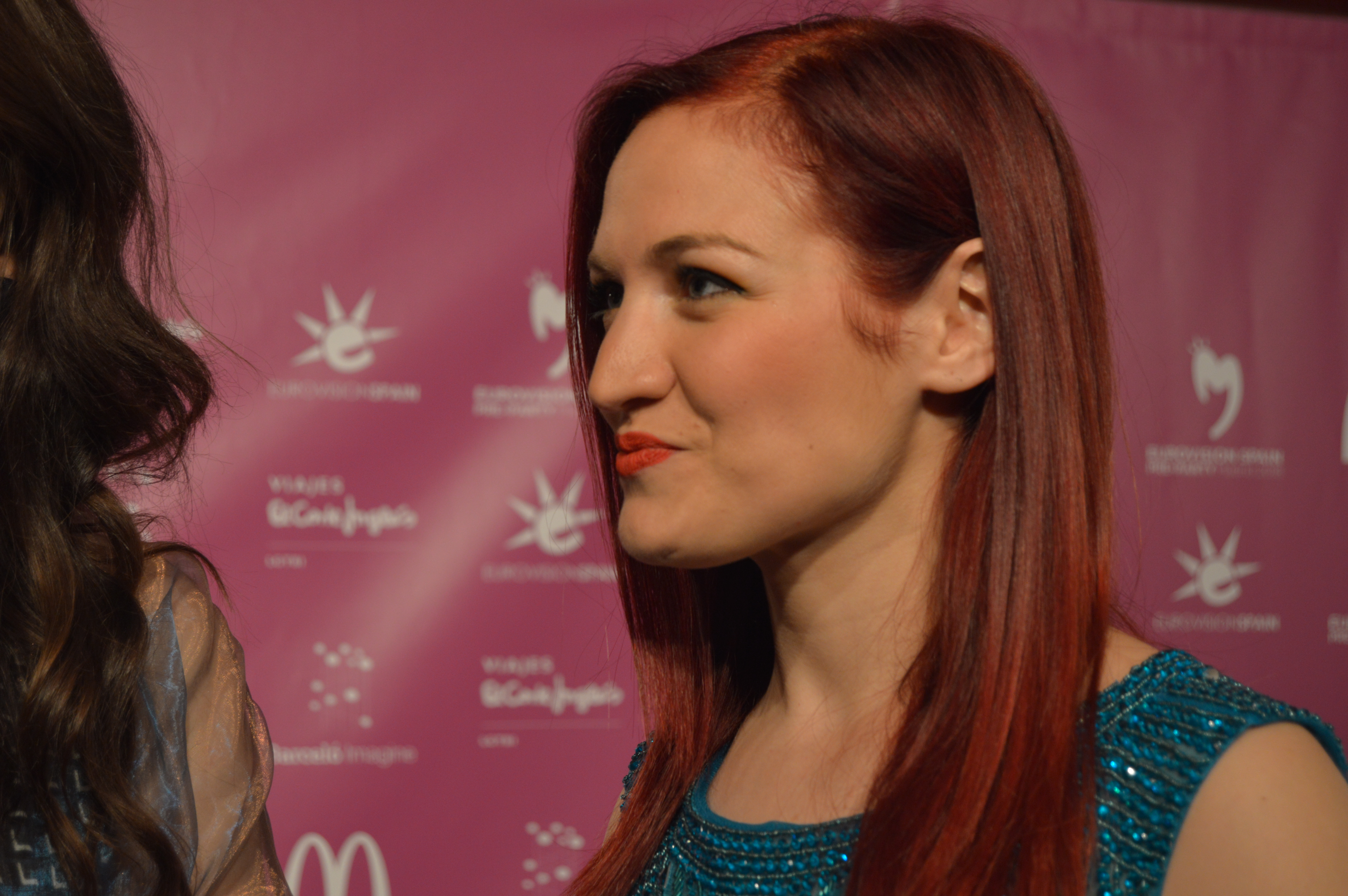 Maltese singer Jessika talks to the media at Eurovision Spain PreParty in Madrid (April 2018)